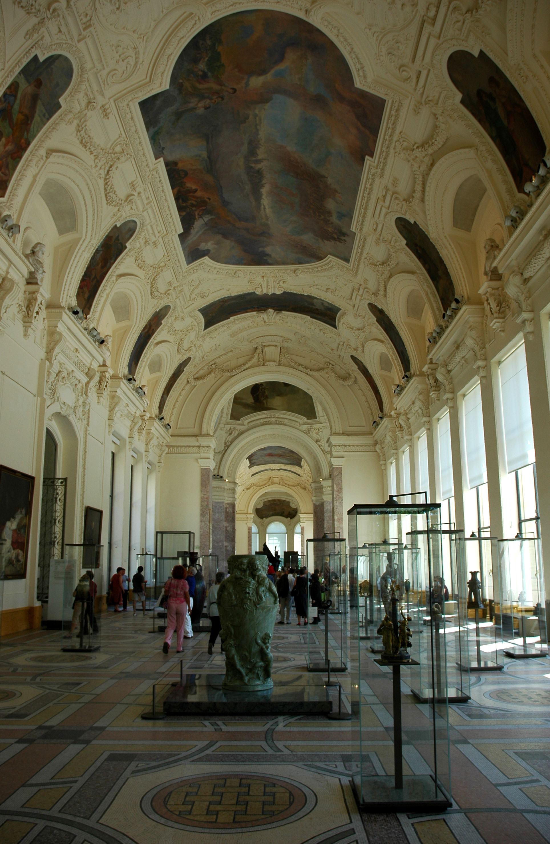 France Paris Petit Palais La galerie des arts décoratifs en 2006 Photographie prise par GIRAUD Patrick